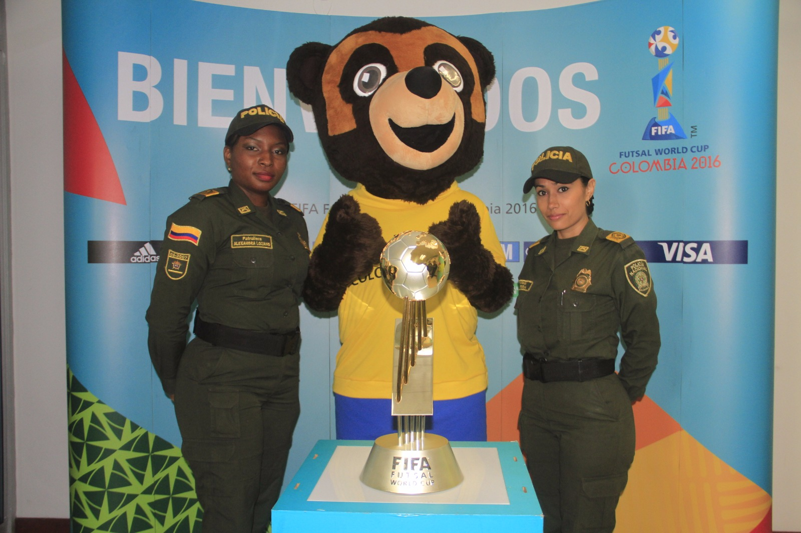 Policía comprometida con la realización de este evento deportivo. Santiago de Cali. La Policía Metropolitana de Cali recibió con orgullo y calle de honor, El trofeo de la Copa Mundial de Futsal de la FIFA Colombia 2016, en el marco del Trophy Tour como antesala al acontecimiento deportivo de talla internacional que se llevará a cabo en nuestro país entre el 10 de septiembre y el 01 de octubre. Durante una mañana, la copa elaborada en oro y bronce, fue exhibida en el comando de la unidad con el ánimo de involucrar y demostrar el compromiso de los uniformados. Los representantes del comité organizador local de Cali para el Mundial de Futsal hicieron entrega simbólica a los uniformados de Policía por el papel que desempeñarán para mantener las condiciones de seguridad y tranquilidad durante la realización del acontecimiento deportivo en esta ciudad, que será sede principal del evento y casa de la Selección Colombia. Cabe anotar que en la ciudad de Santiago de Cali se realizarán los actos protocolarios de inauguración, se disputará la primera fase del torneo y se llevará a cabo la posterior clausura del encuentro deportivo. Medellín y Bucaramanga, otras ciudades donde estará presente el Fútbol de Salón. Las actividades se desarrollaran en el Coliseo del Pueblo de la ciudad para lo cual la institución ya prepara dispositivos especiales de seguridad que garanticen a propios y visitantes tranquilidad y convivencia pacífica.